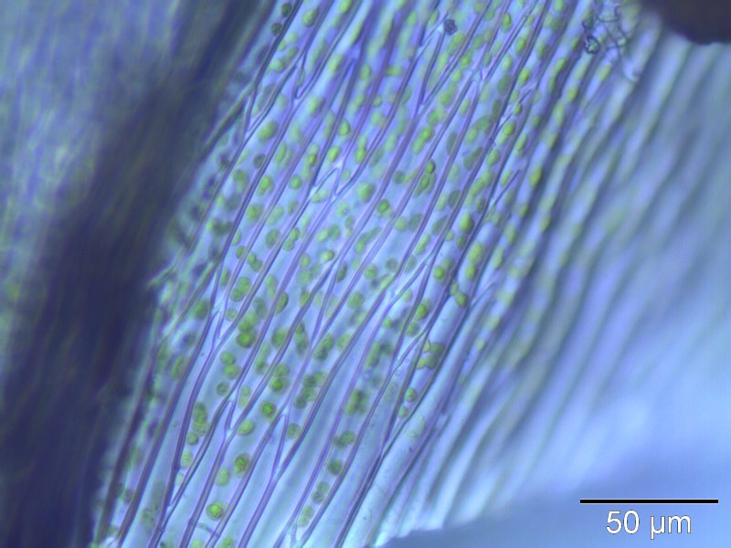 Brachythecium rutabulum, Laminazellen bei 400x Vergrößerung, Rostock